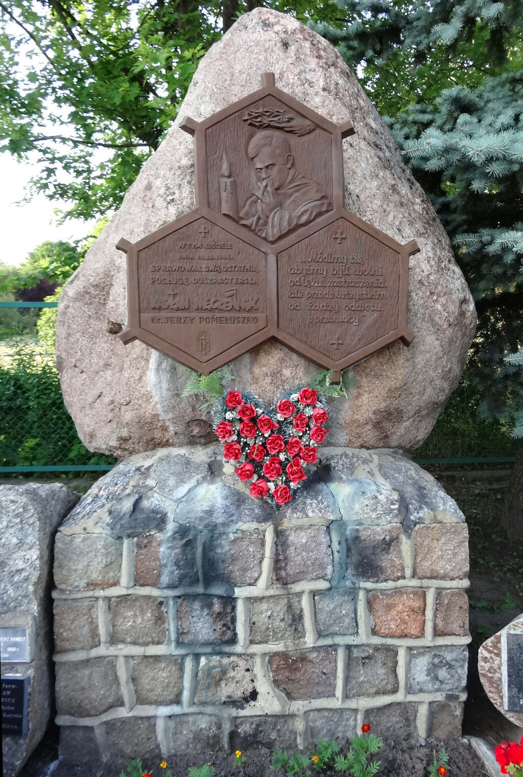 Pomnik błog. ks. Jerzego Popiełuszki ustawiony na terenie Sanktuarium Nowych Męczenników w Bydgoszczy na osiedlu Wyżyny przed kościołem, gdzie odprawił ostatnią w swoim życiu mszę św. i skąd wyruszył w drogę do Warszawy, gdzie został zamordowany